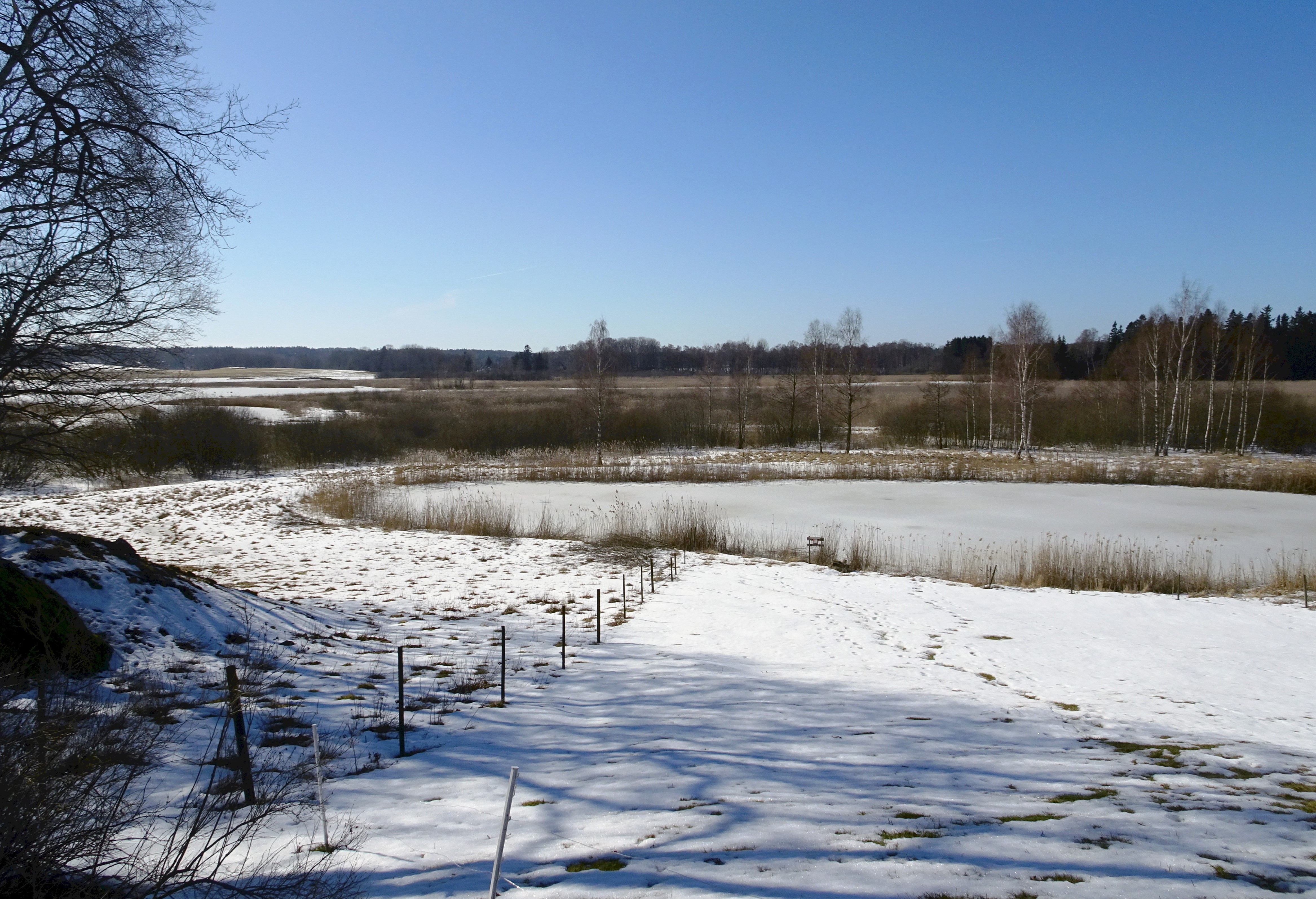 Östra Styran sedd från Vansta gård